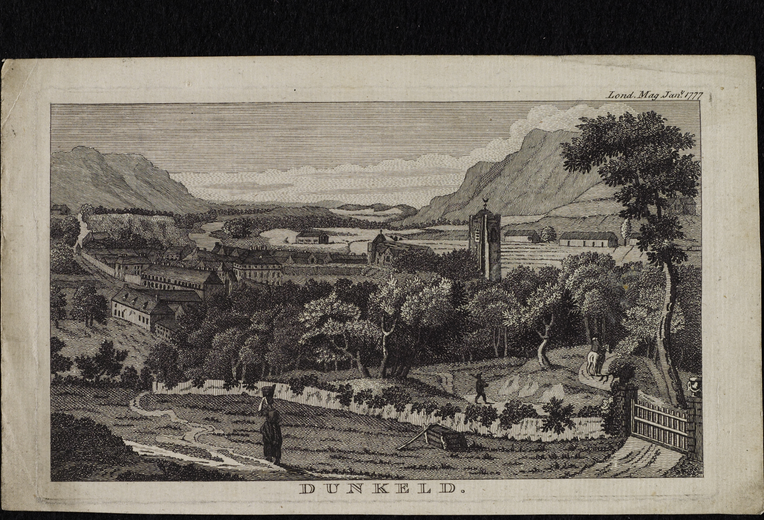 Dunkeld. London Magazine, Jan. 1777